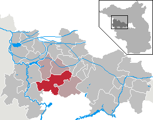 Nennhausen in Brandenburg (Country) - District Havelland